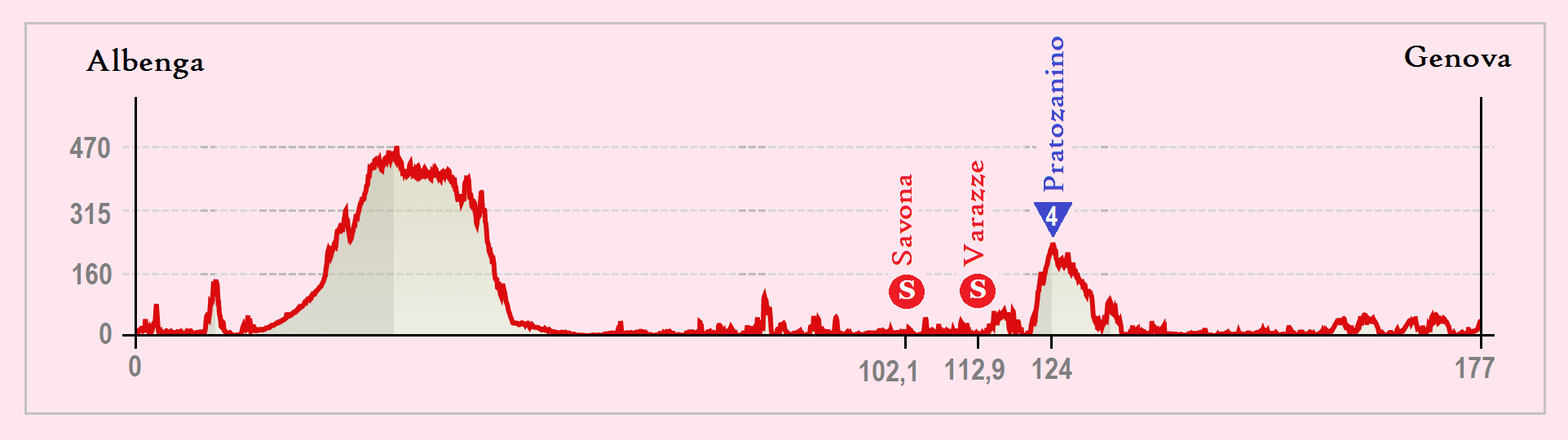 Perfil de la 2.ª etapa del Giro de Italia 2015